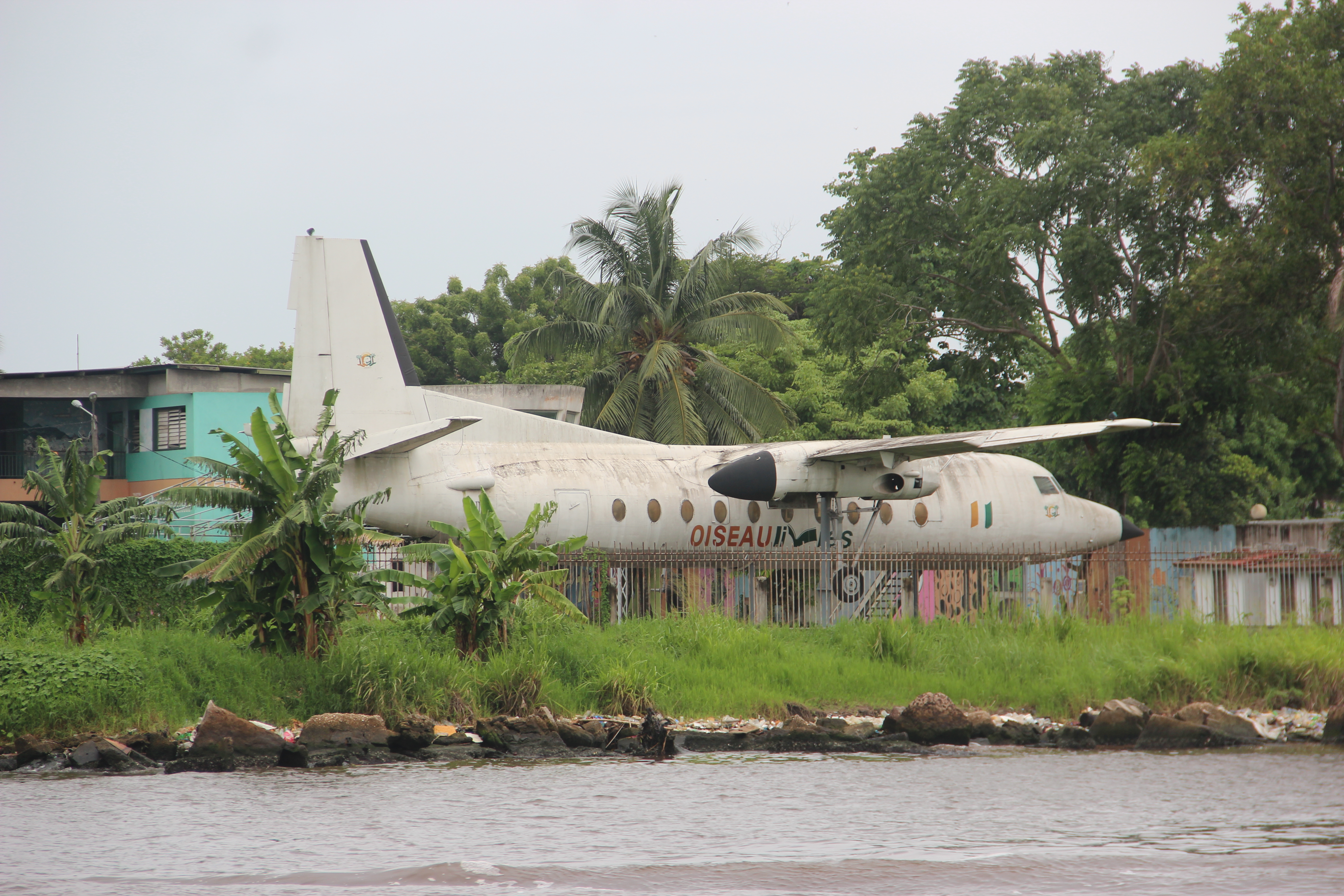 L'oiseau-livres, ancien avion présidentiel de Félix Houphouët Boigny, reconverti en bibliothèque au Palais de la Culture d'Abidjan. This is an image with the theme "Africa on the Move or Transport" from: Ivory Coast